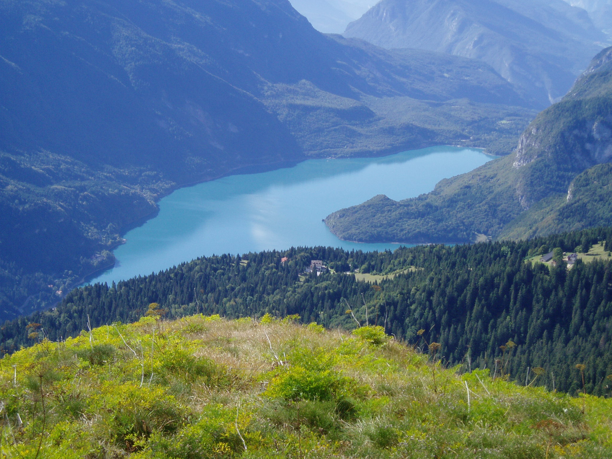 "Lago Molveno from Montisello"